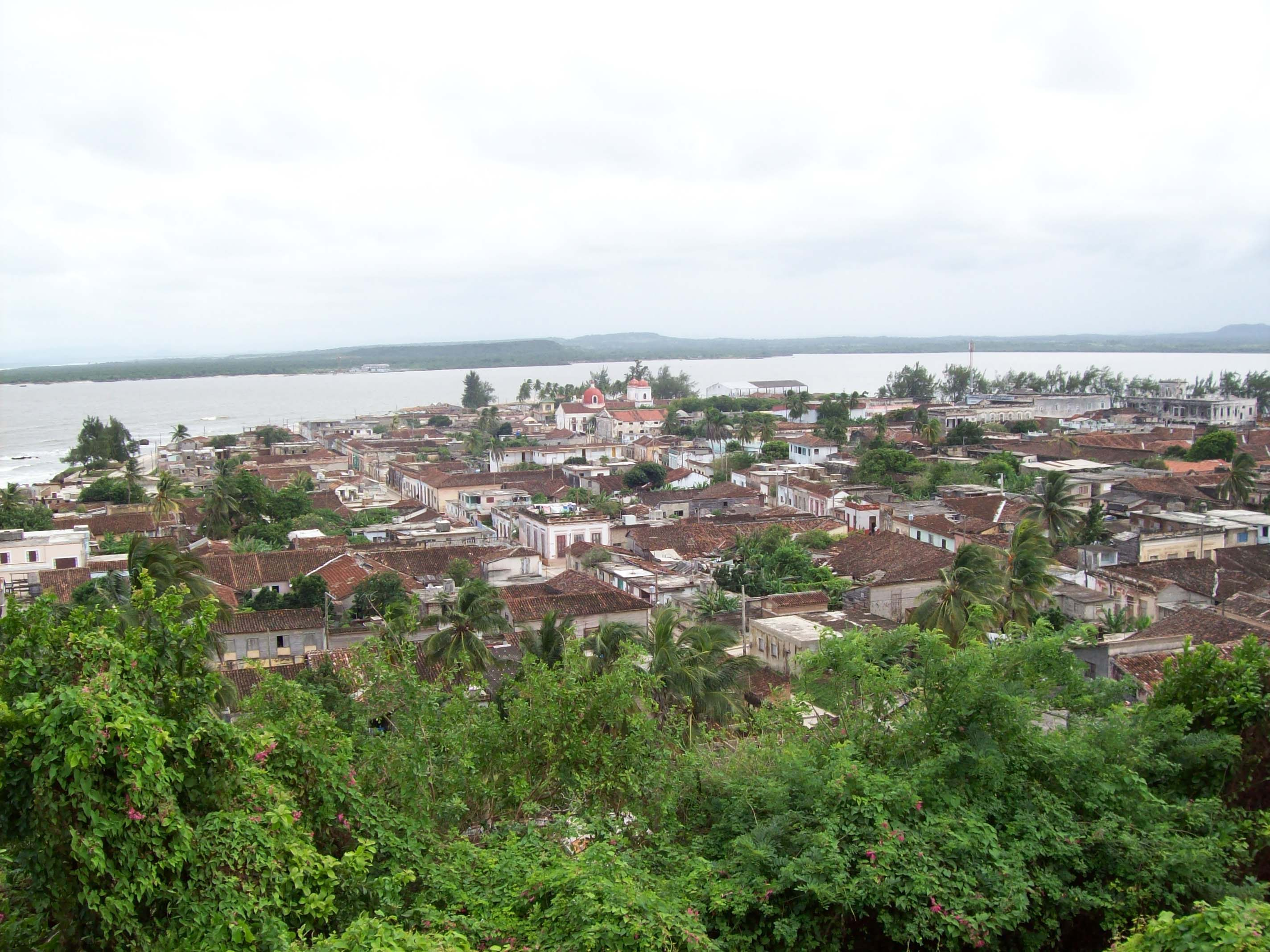 Image:La Villa de Gibara. Monumento Nacional